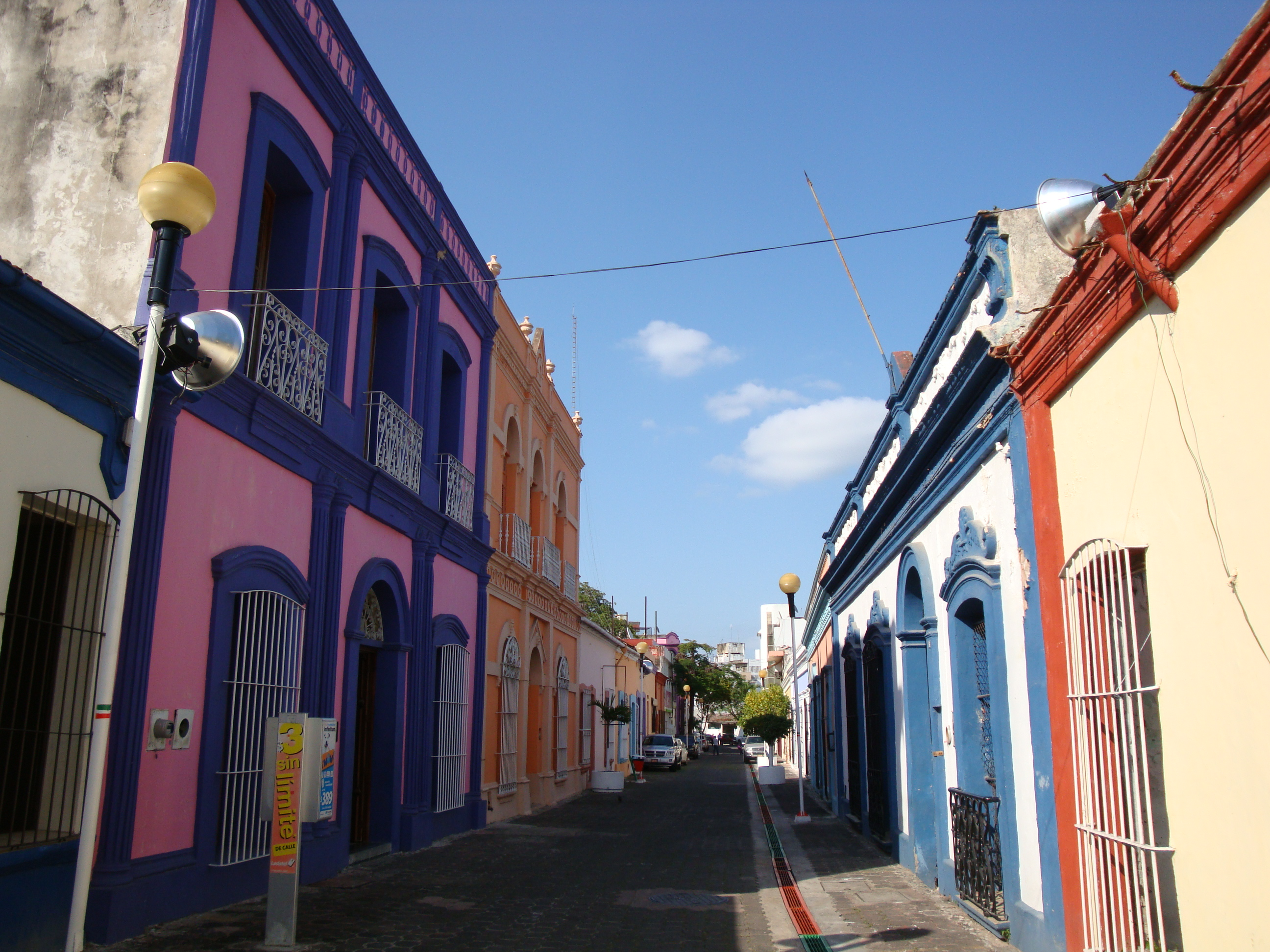 Calle Narciso Sáenz, en El Centro Histórico de Villahermosa, Tabasco, México.